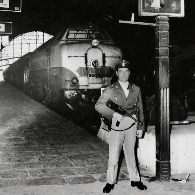 Un miembro del ejército custodia una locomotora Alsthom 8011 durante el Plan Conintes en La Plata, 1958. This image contains digital watermarking or credits in the image itself. The usage of visible watermarks is discouraged. If a non-watermarked version of the image is available, please upload it under the same file name and then remove this template. Ensure that removed information is present in the image description page and replace this template with Metadata from image or Attribution metadata from licensed image . Caution: Before removing a watermark from a copyrighted image, please read the WMF's analysis of the legal ramifications of doing so, as well as Commons' proposed policy regarding watermarks. If the old version is still useful, for example if removing the watermark damages the image significantly, upload the new version under a different title so that both can be used. After uploading the non-watermarked version, replace this template with Superseded | new filename | version without watermarks .